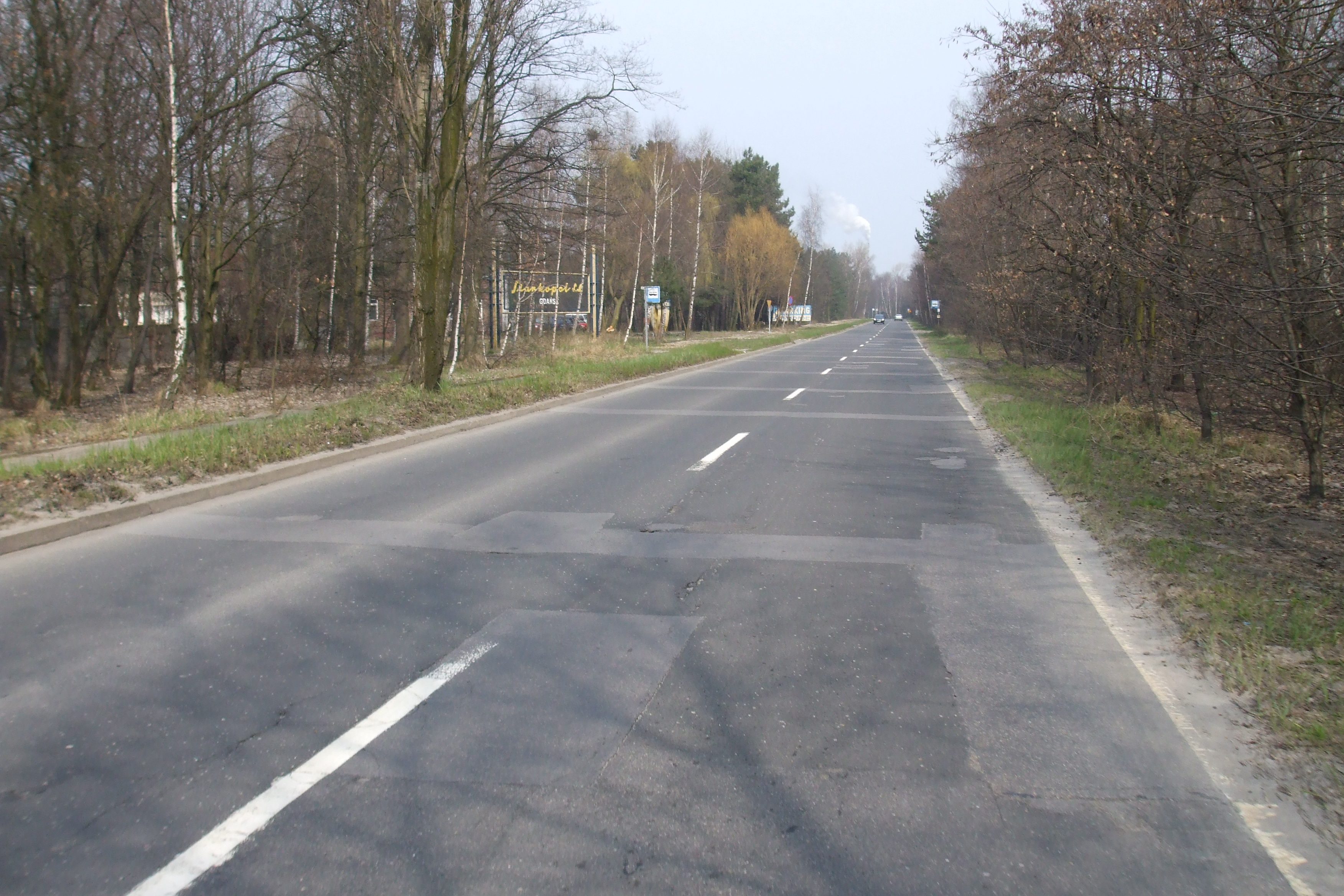 Gdańsk, ul. Sucharskiego.